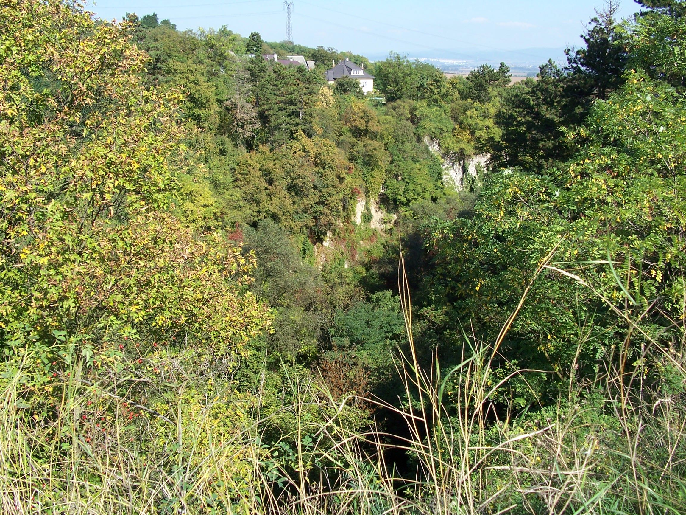 Haluzická prierva, chránený prírodný výtvor v intraviláne obce Haluzice